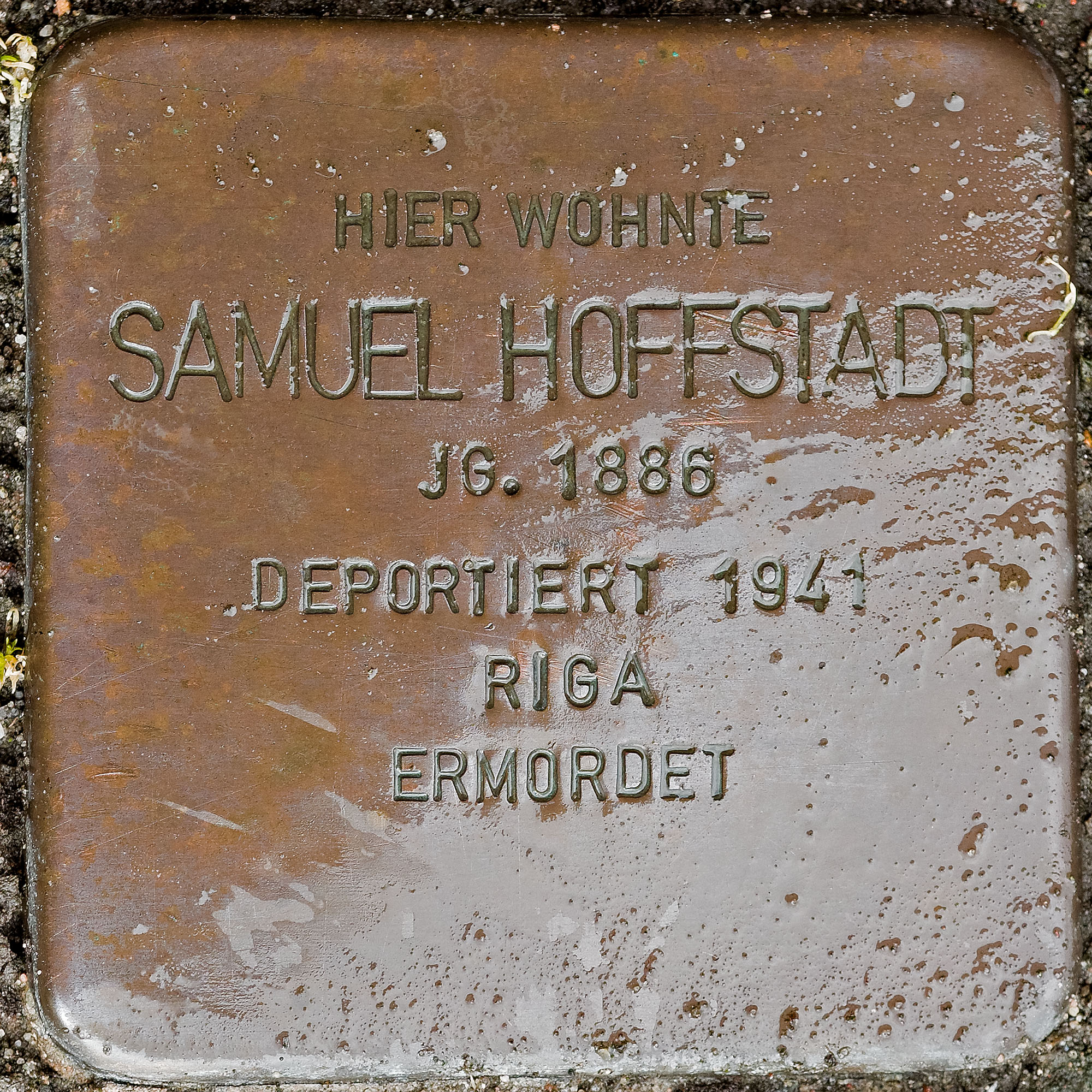 Stolpersteine Straelen: Hoffstadt, Samuel